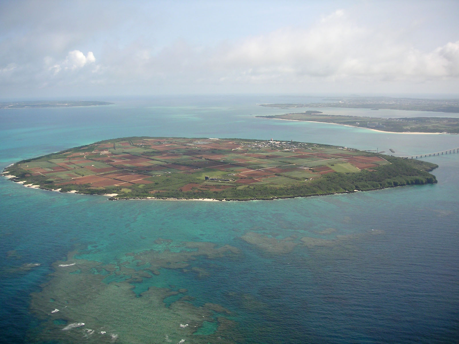 Kurima Island, Japan / 来間島（宮古諸島）